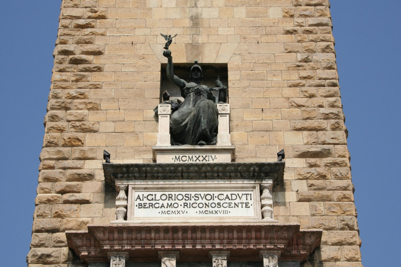 La Torre dei Caduti a Bergamo. Particolare.